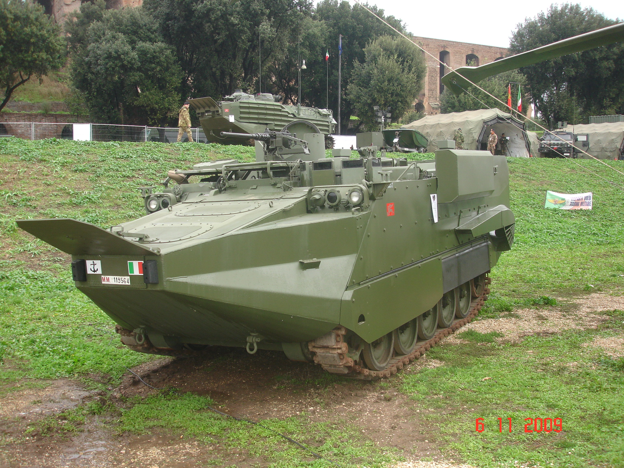 Arisgator, veicolo anfibio del reggimento San Marco esposto a Roma in occasione delle forze armate.